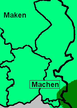 Eigen kaart